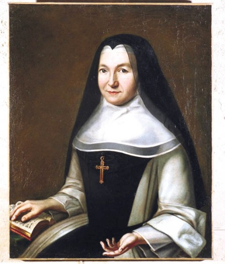 Luise Hollandine von der Pfalz (1622-1709), als Zisterzienserin